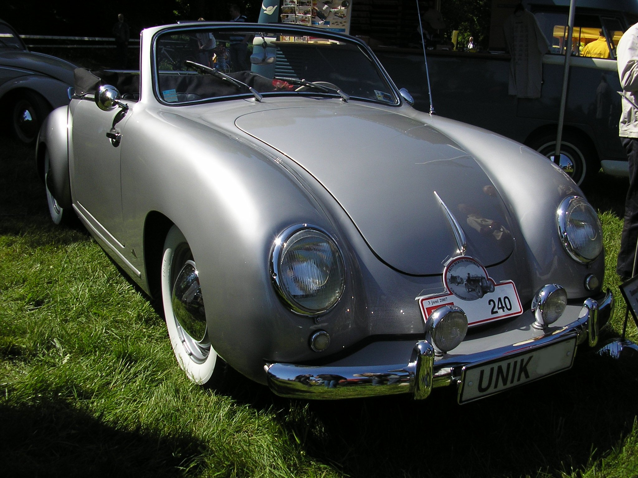 1953 Volkswagen LIM 10/11